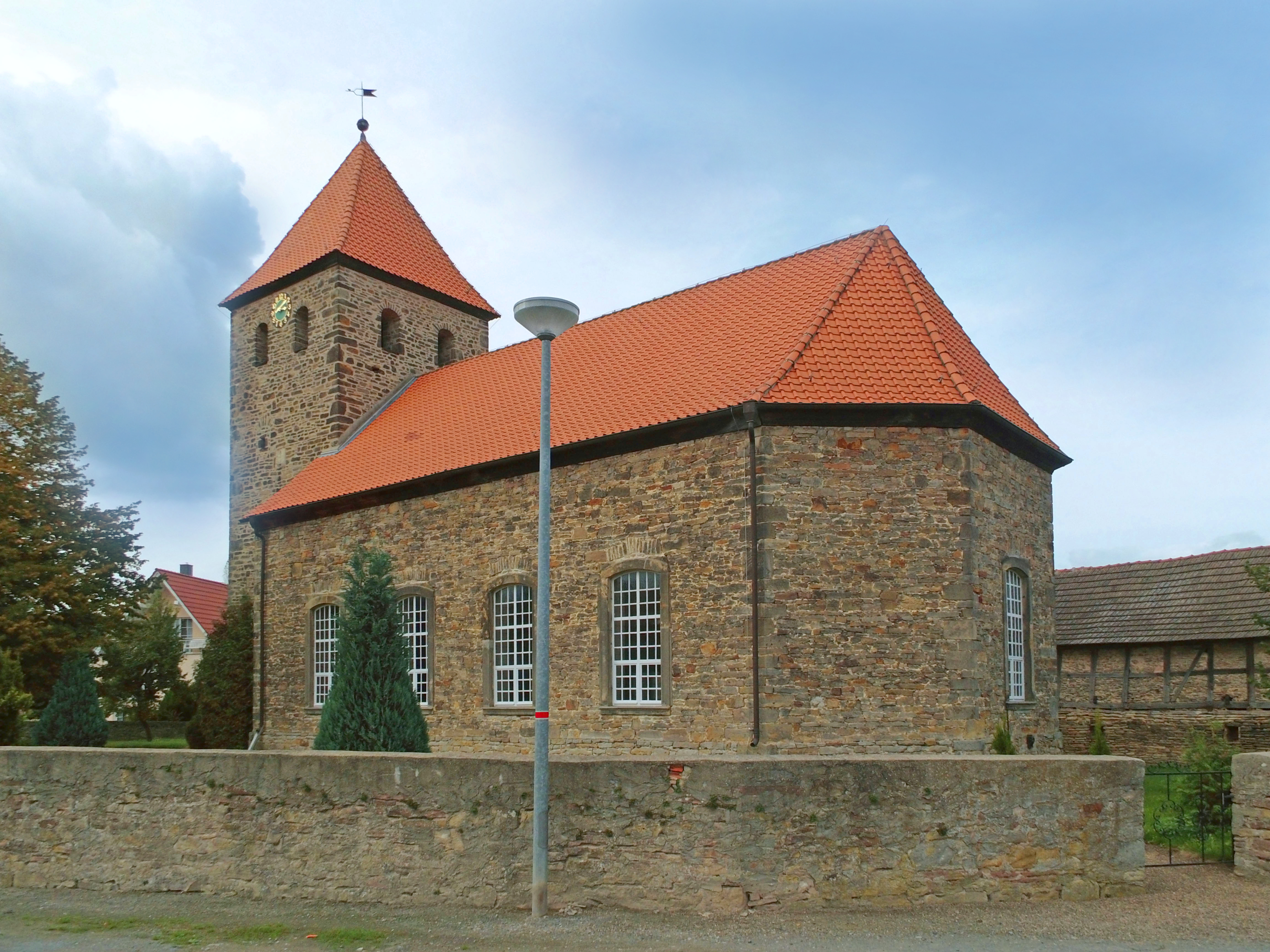 Evangelisch-lutherische Kirche in Eschenrode.